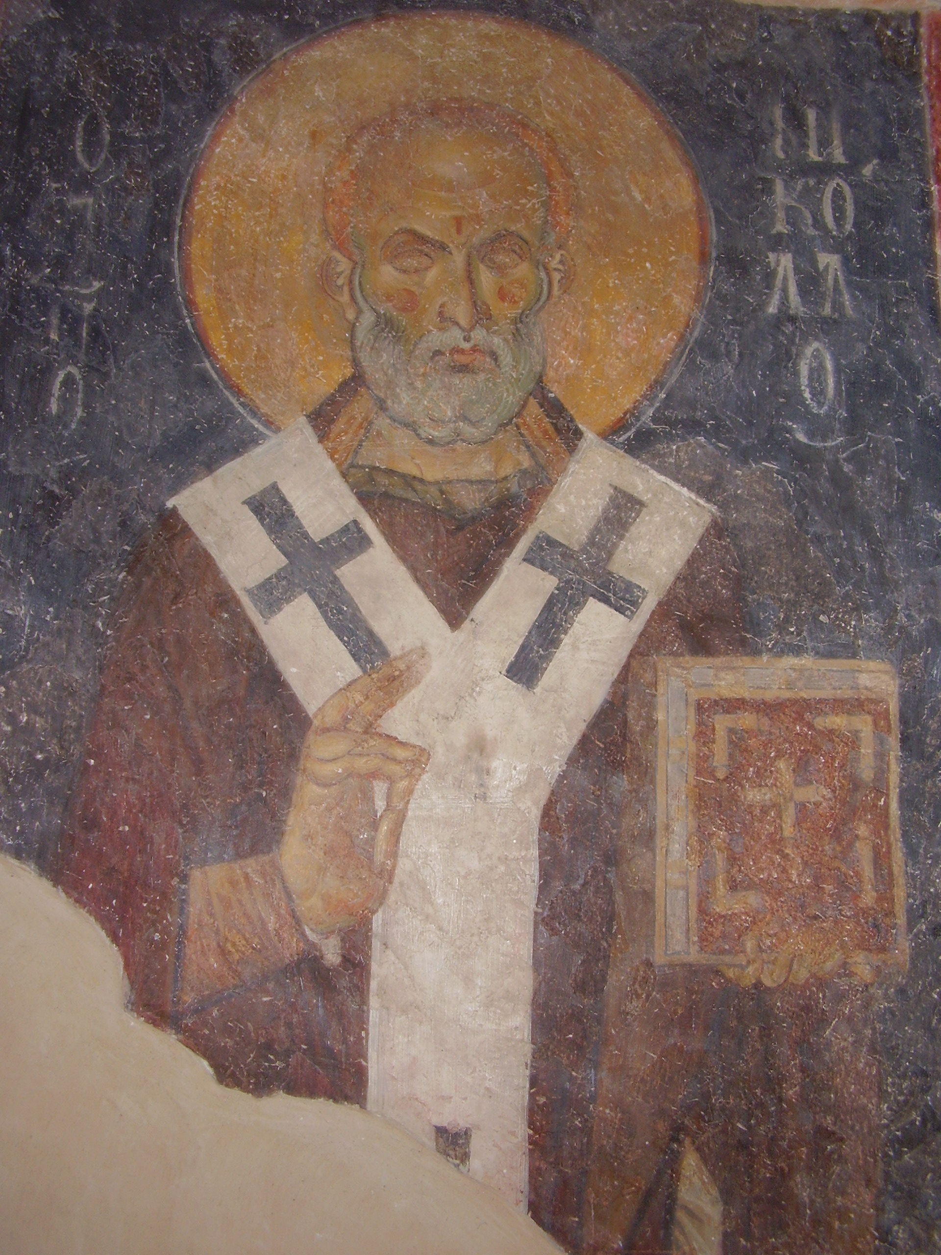 Църквата "Свети Георги" - средновековни стенописи : Свети Никола (Saint Nicholas)